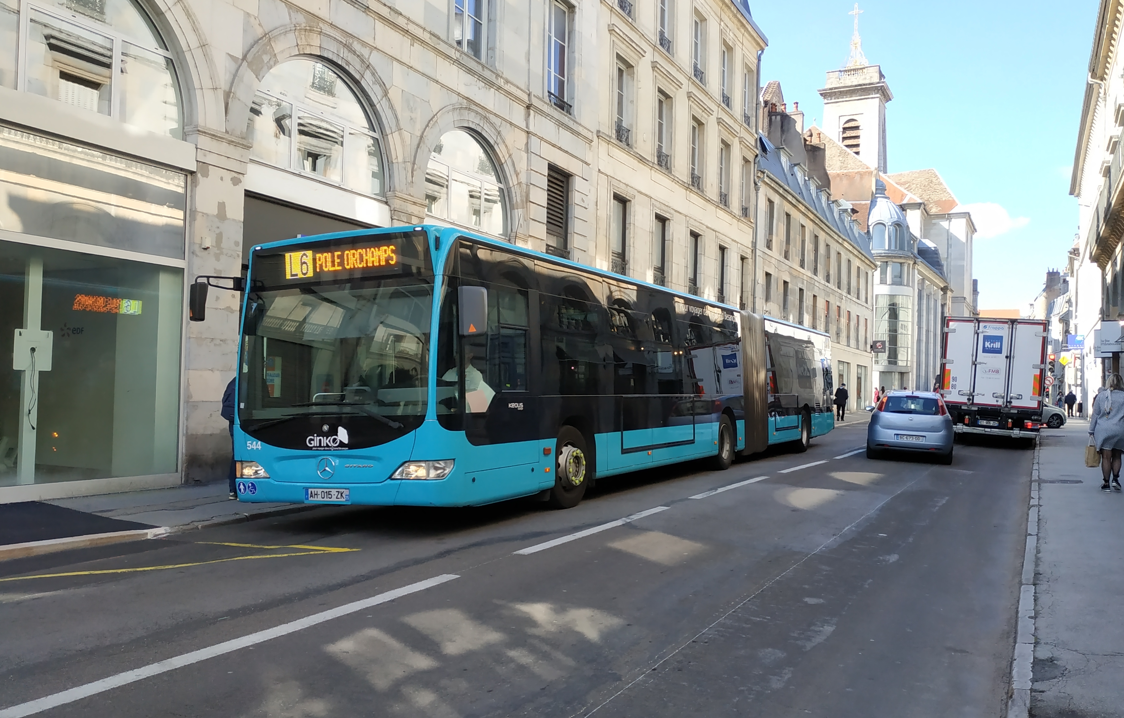 Mercedes-Benz Citaro G Ginko n°544